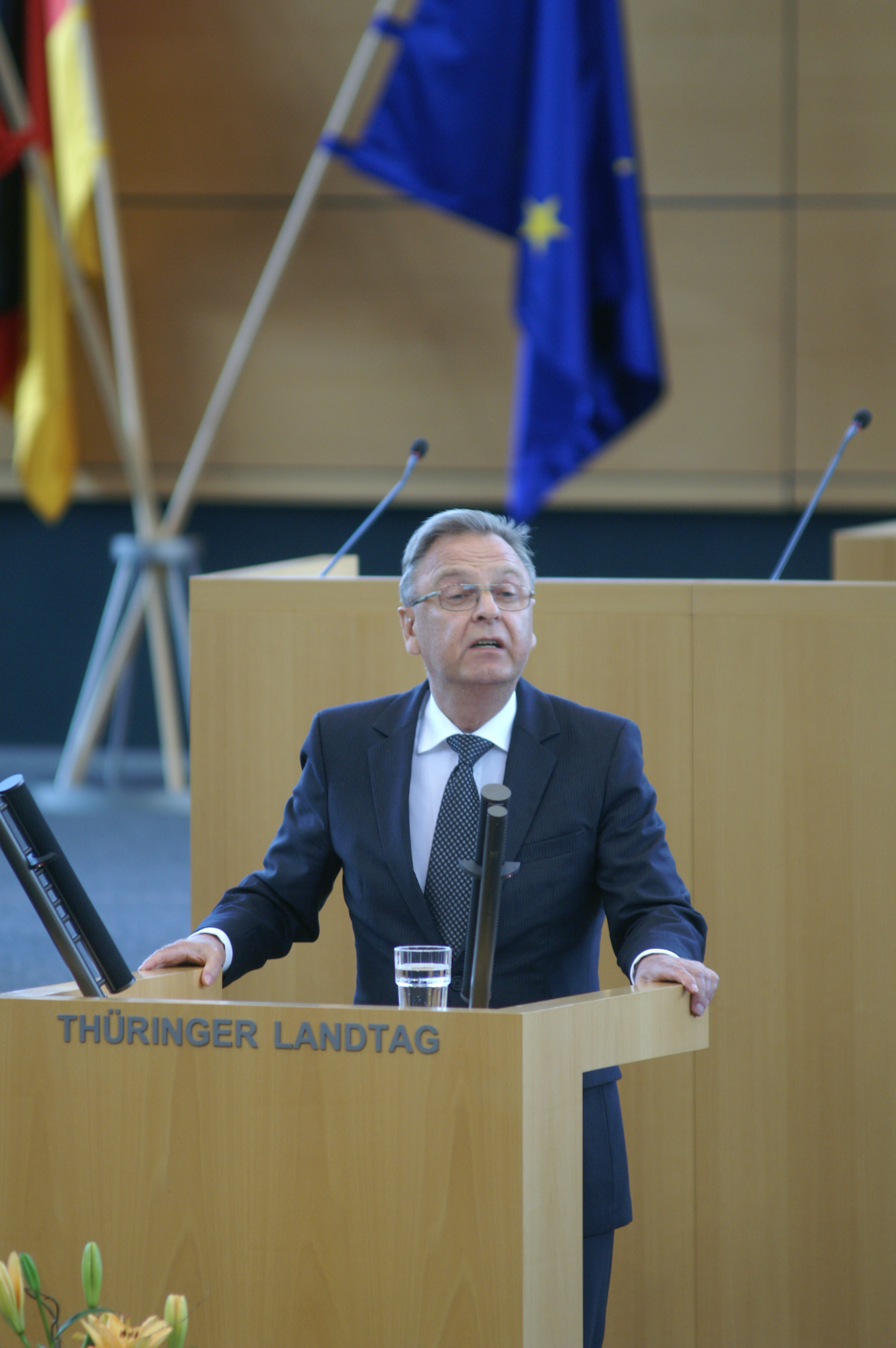 Hans-Jürgen Papier, 13. Kongreß der Stasibeauftragten im Thüringer Landtag. Der Präsident des Bundesverfassungsgerichts Prof. Dr. Hans-Jürgen Papier hielt den Festvortrag im Plenarsaal des Landtags.